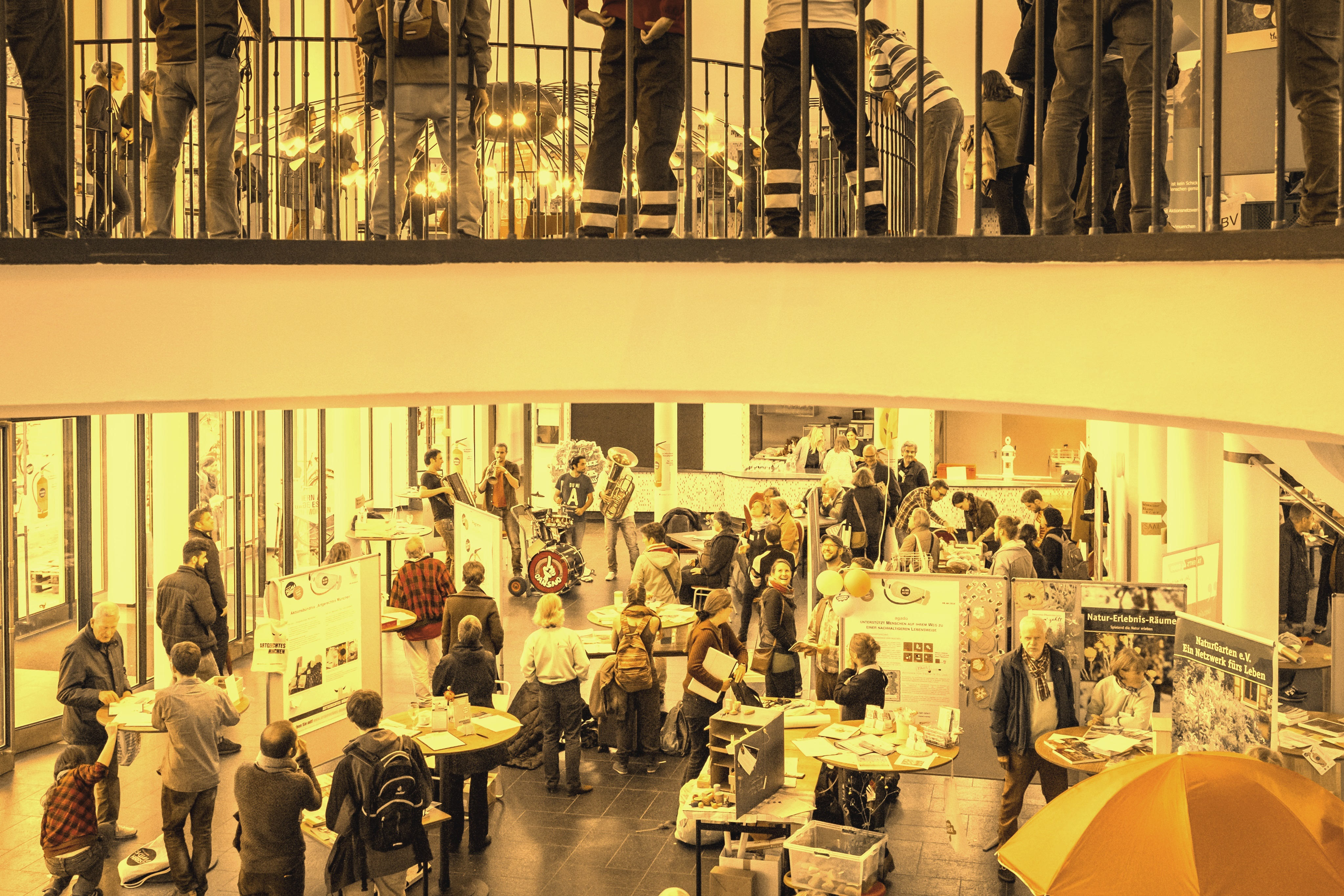 KlimaDult